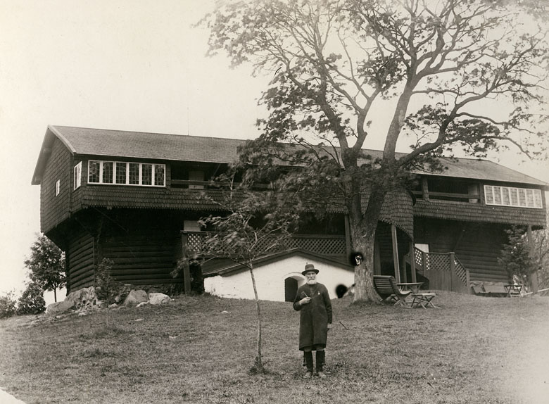 Man framför Ornässtugan, som är ett medeltida gästhus med loft som byggdes i början av 1500-talet. Motiv: Ornässtugan Nyckelord: Byggnadsminnen:Statl, Riksintressen Kategori: Bondgård, Museum Man framför Ornässtugan, som är ett medeltida gästhus med loft som byggdes i början av 1500-talet.